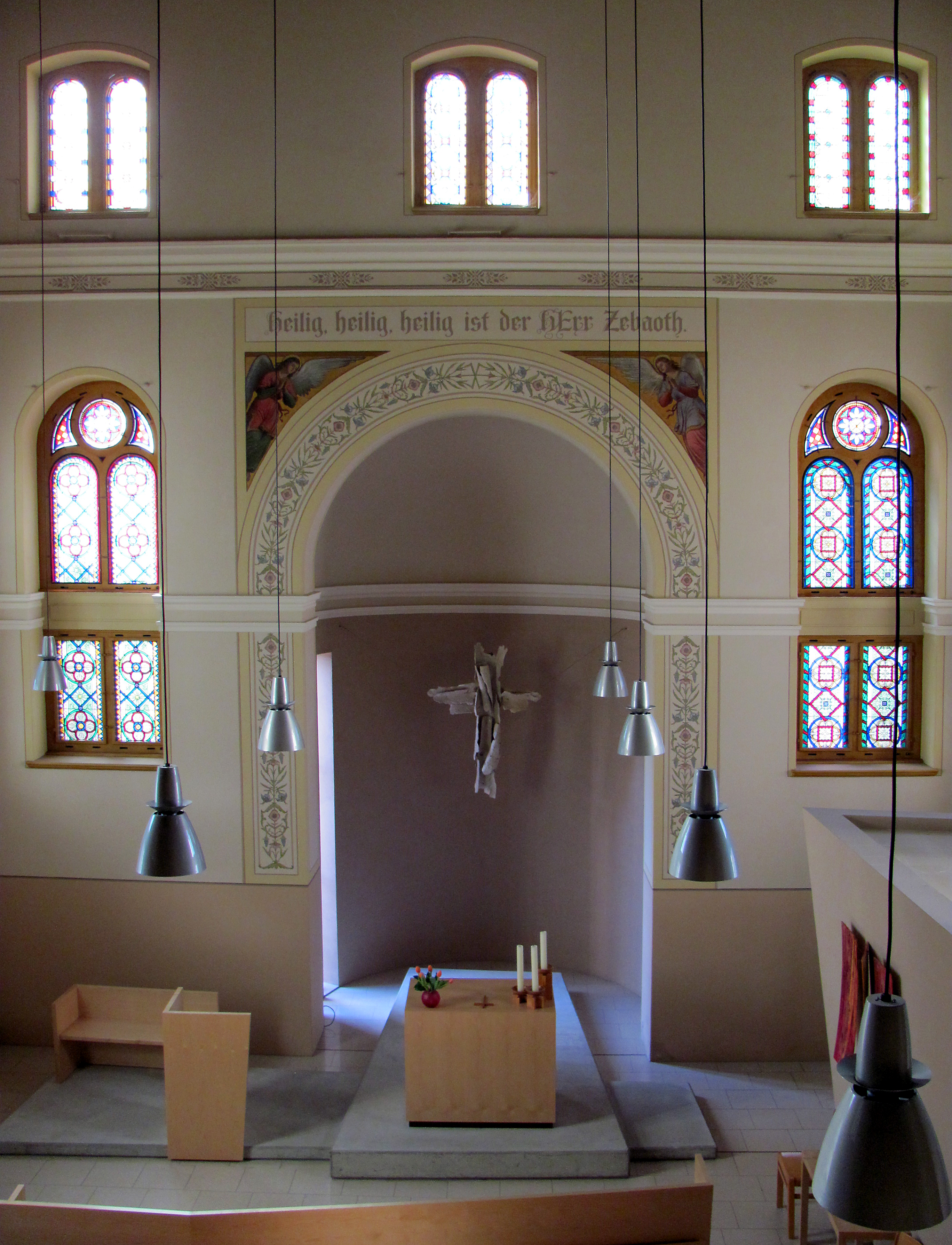 Raum der Stille im Radebeuler Krankenhaus